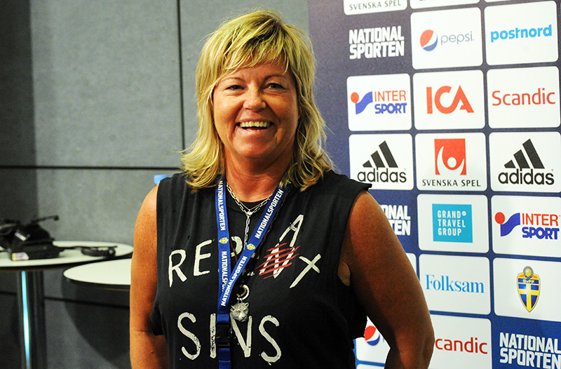 Marika Domanski-Lyfors